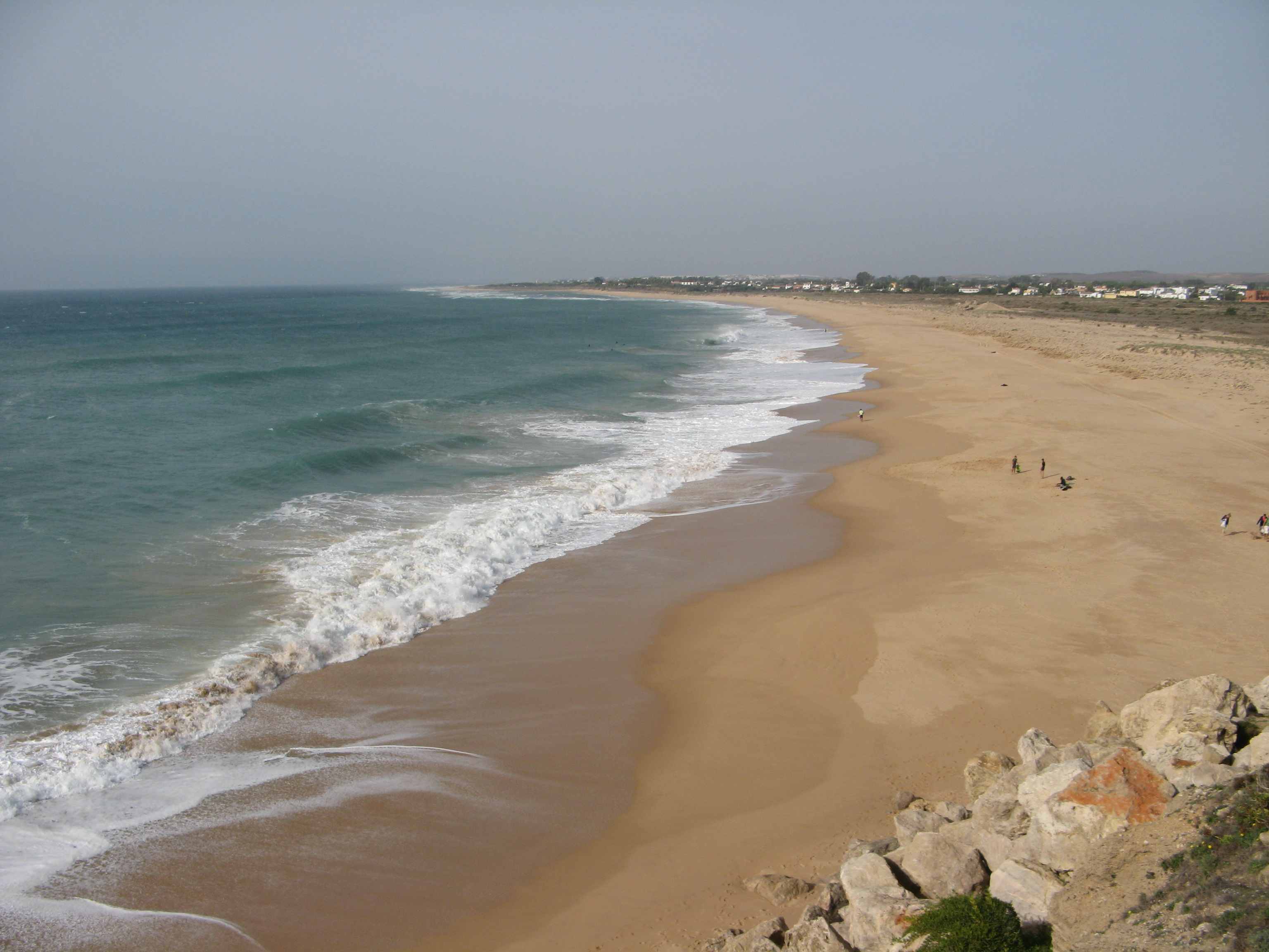 Playa de Zahora